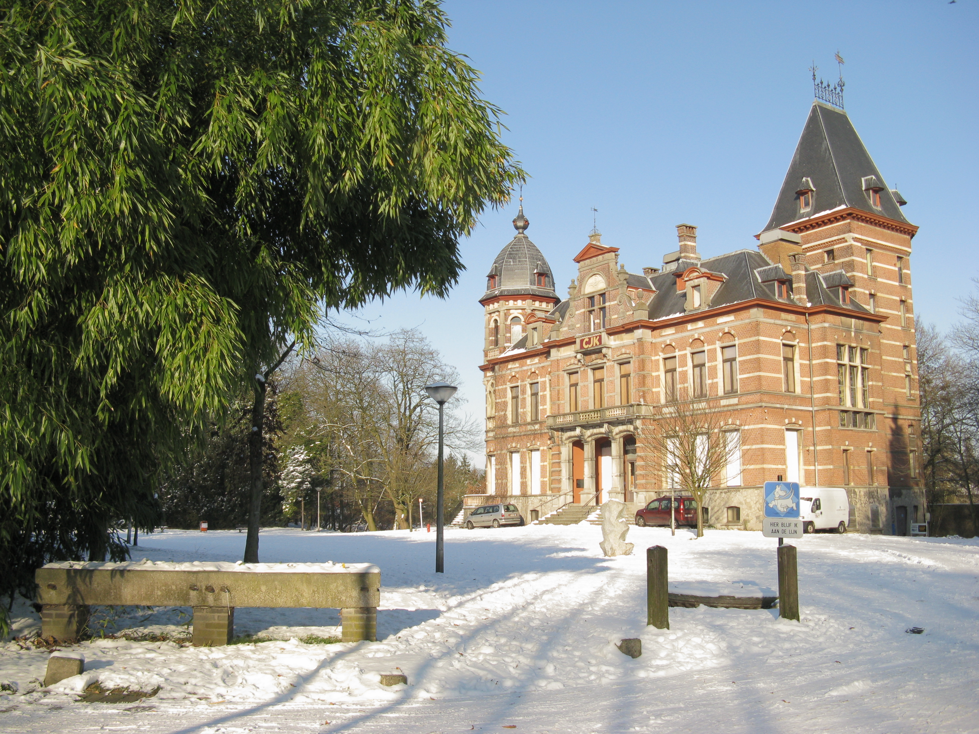 Kasteel in het stedelijk domein Claeys Bouuaet in Mariakerke, Gent.